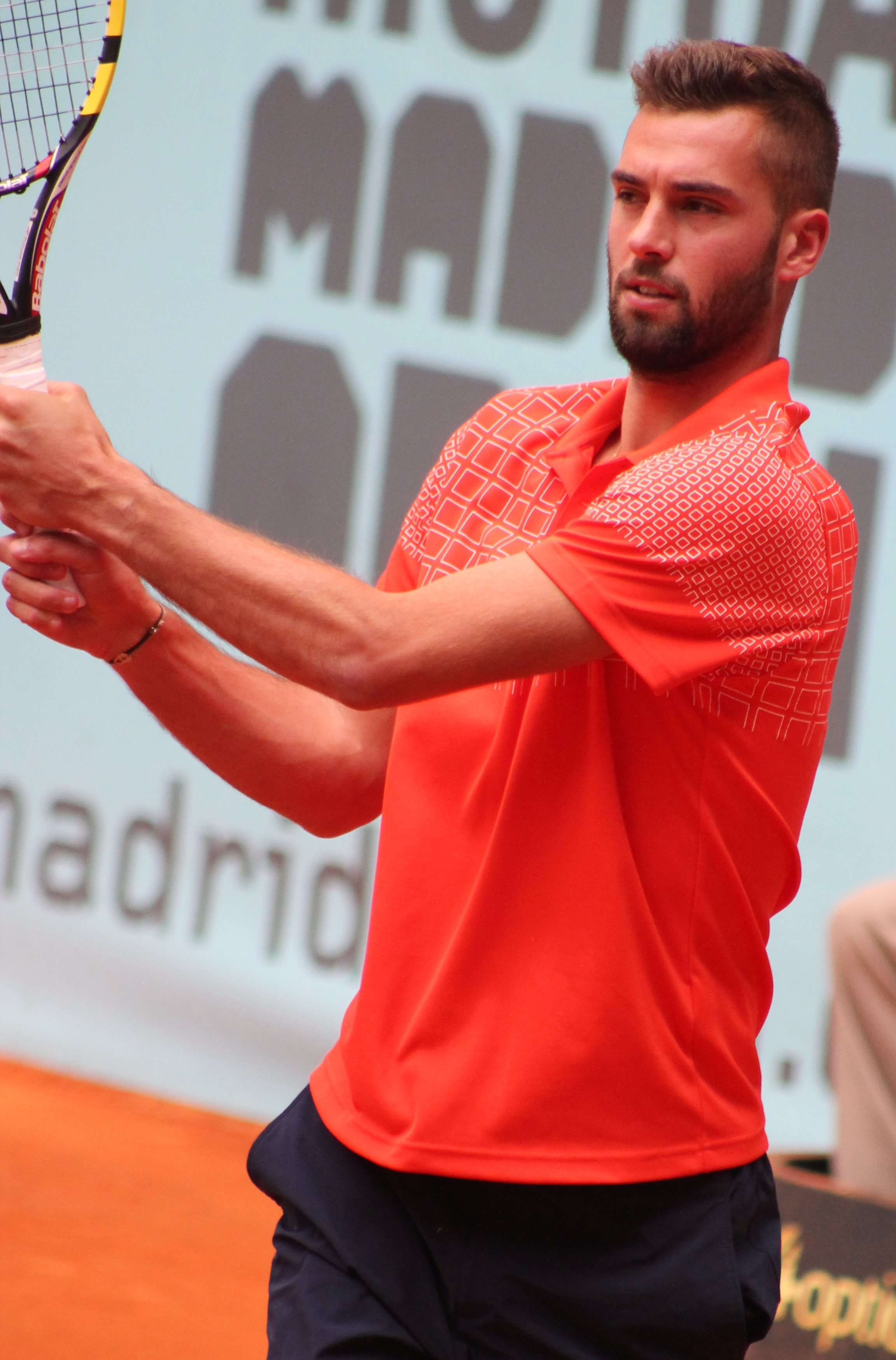 Paire MA14 (5)